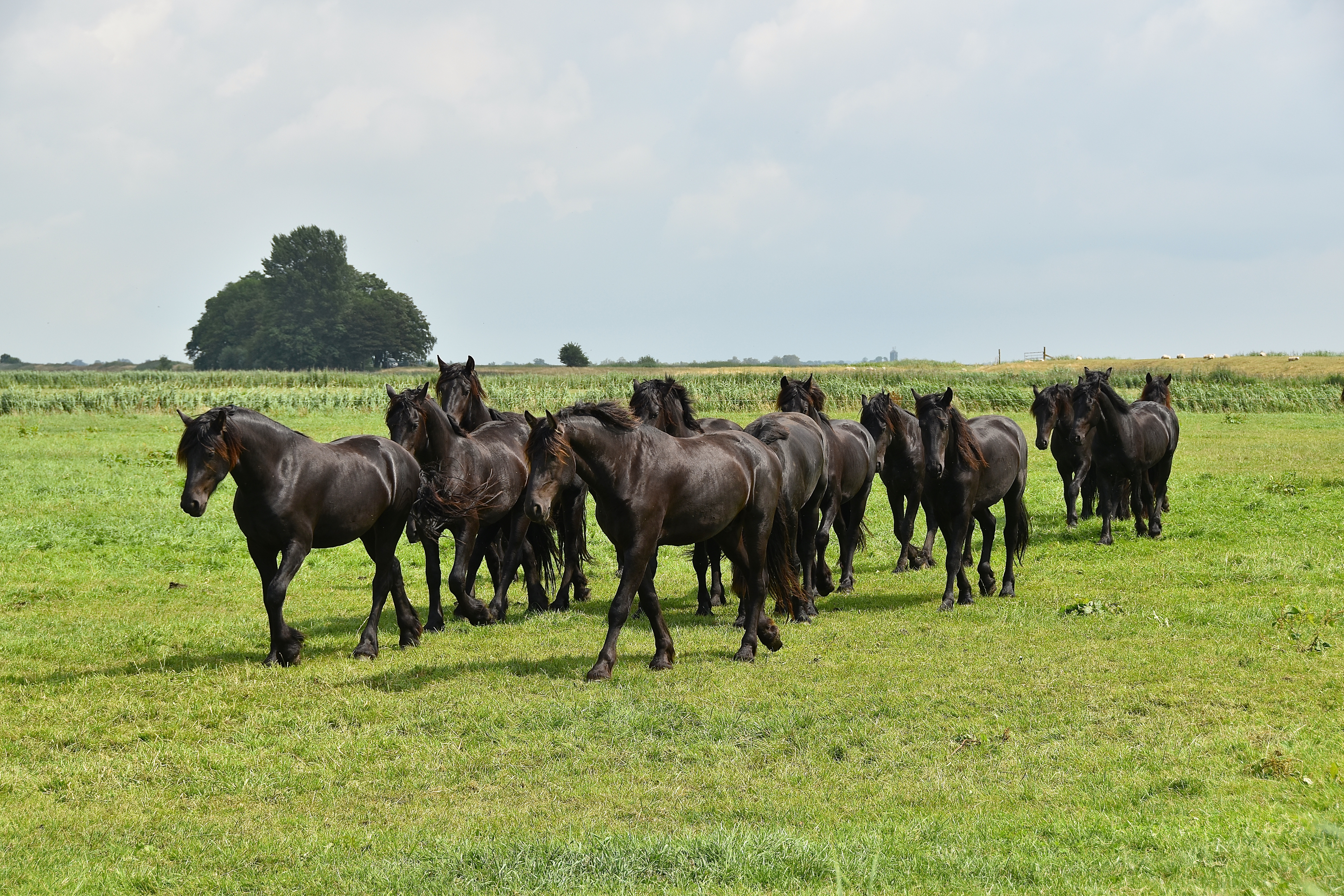 Het Friese paard is het oudste inlandse raspaard van Nederland. Zijn wortels gaan ver terug in de tijd. Al in de 13e eeuw was de Fries bekend en het paard vertoont nog steeds overeenkomsten met zijn verre voorouders. Friese paarden werden waarschijnlijk al meer dan drieduizend jaar geleden gebruikt.